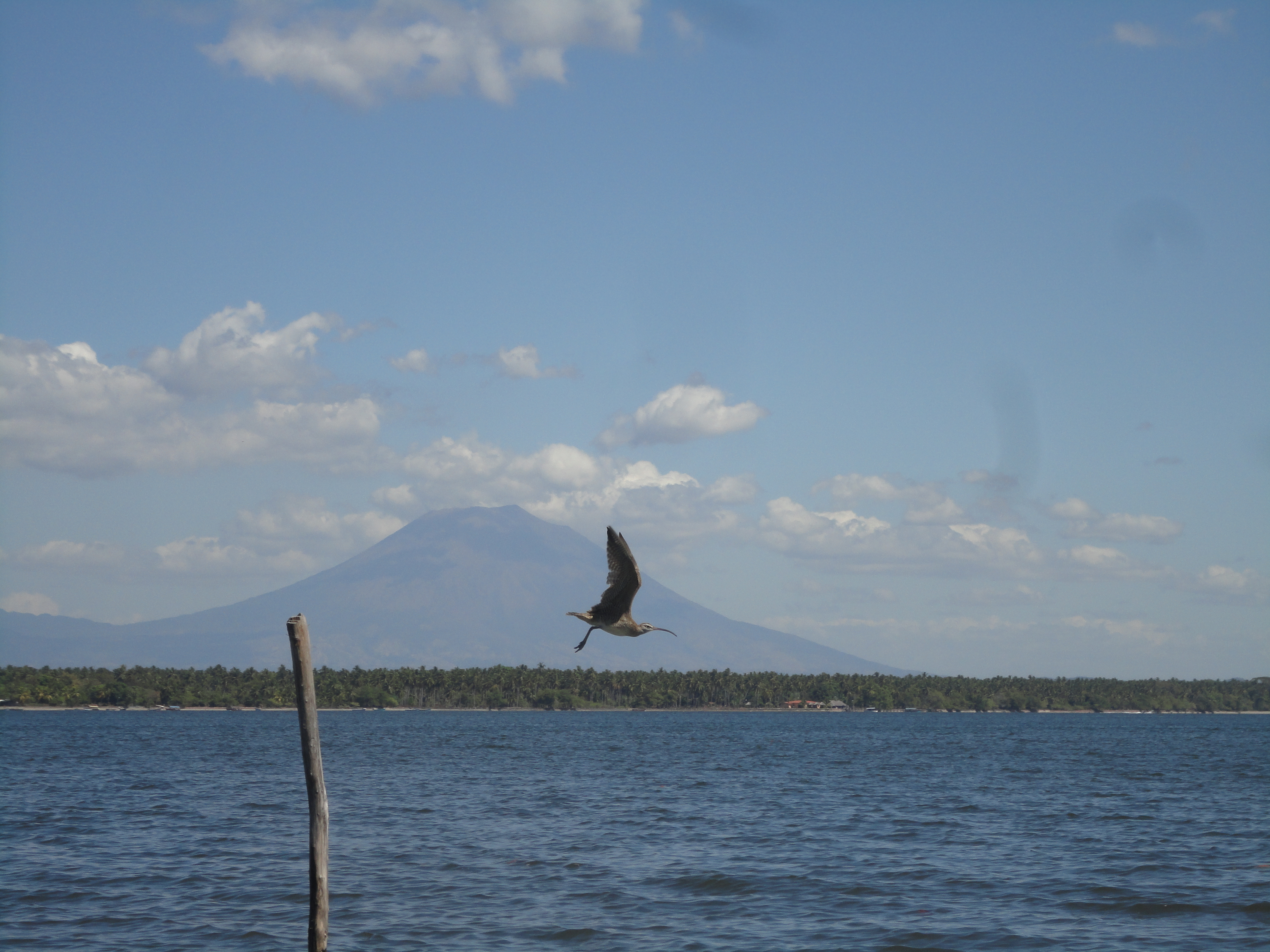 Ave en pleno vuelo, Bahia de Jiquilisco, Usulutan